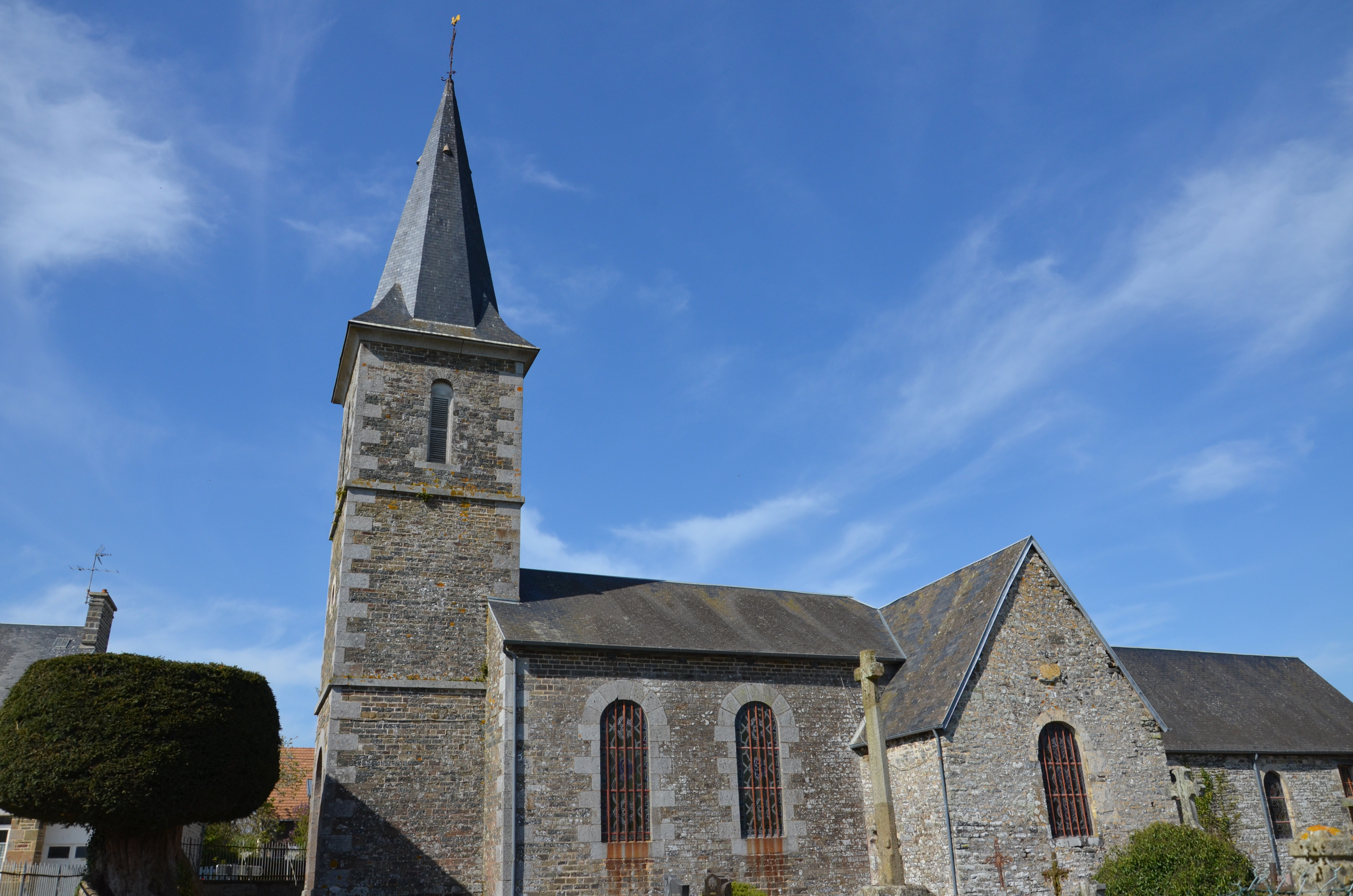 Église Saint-Denis de Saint-Denis-Maisoncelles.